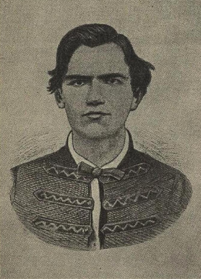 Václav Šolc (1838-1871), český herec a básník